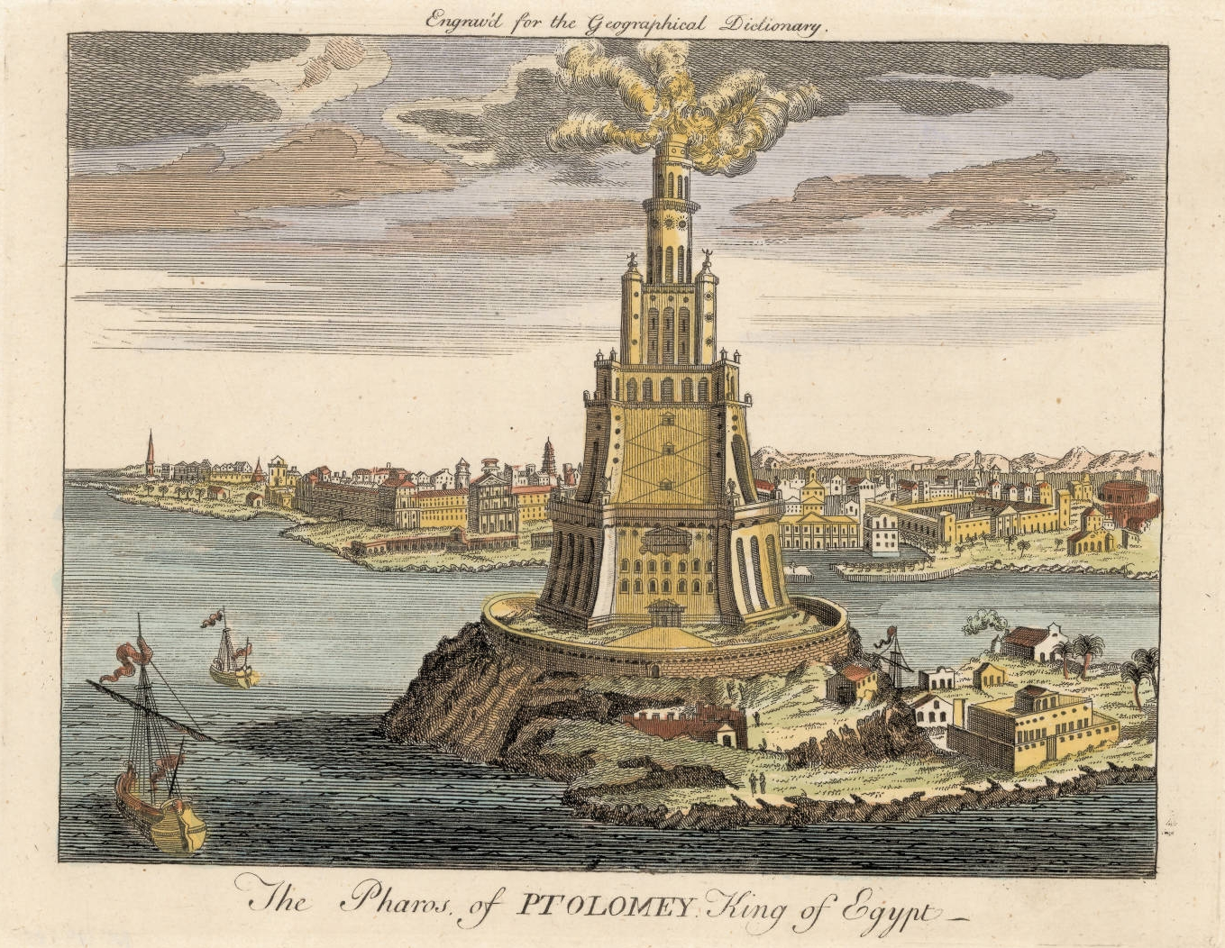 Александрийский маяк